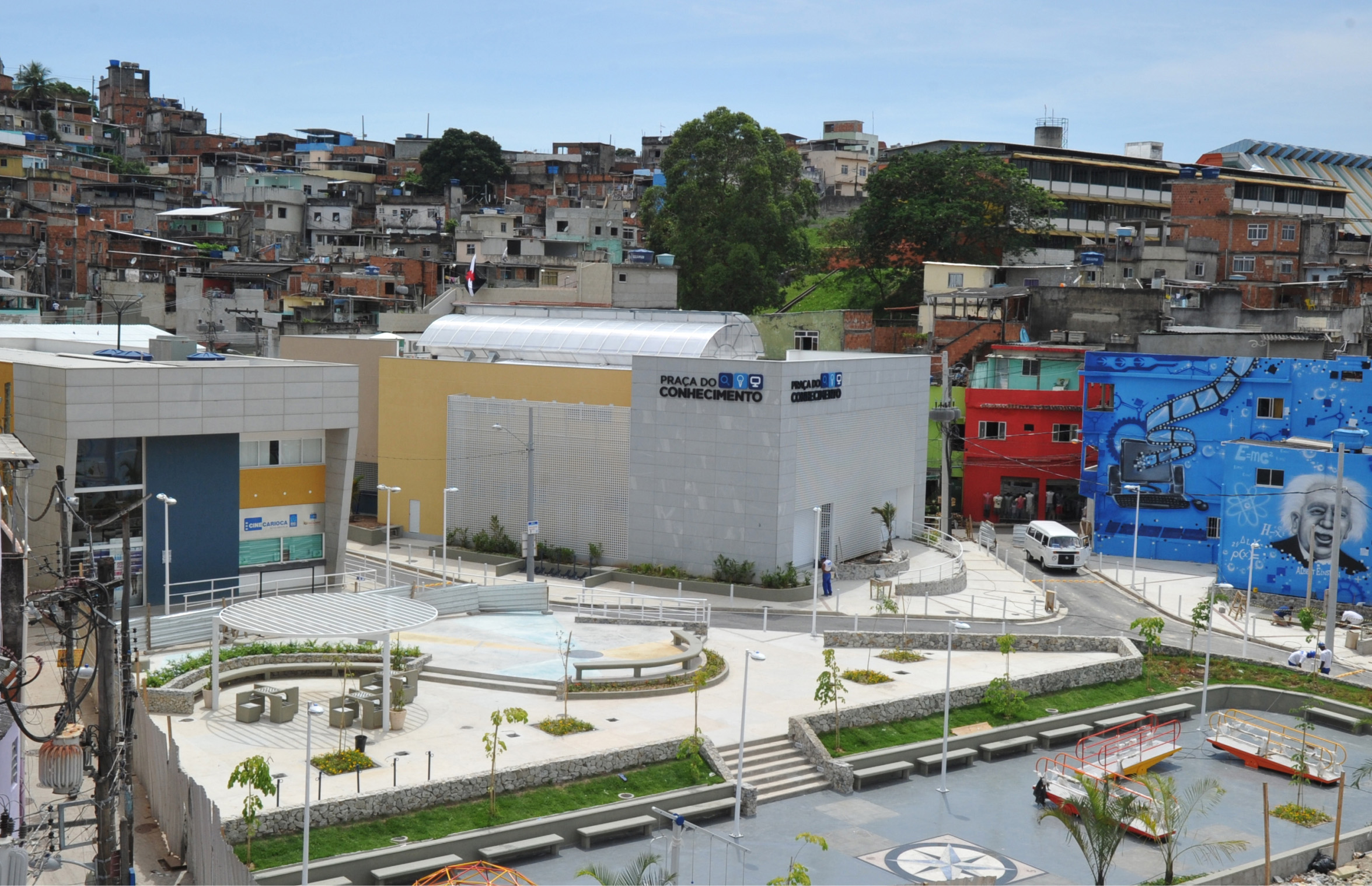 Praça do Conhecimento, situada na Favela Nova Brasília, no Complexo do Alemão. Foi feita no âmbito do Morar Carioca, um programa de urbanismo desenvolvido pela Prefeitura da Cidade do Rio de Janeiro.